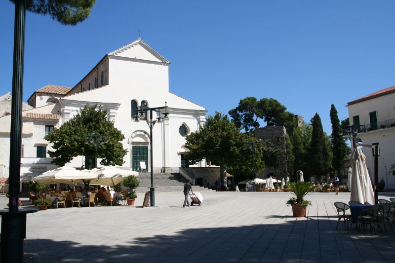 Ravello, Campania, ItaliaIMG_803